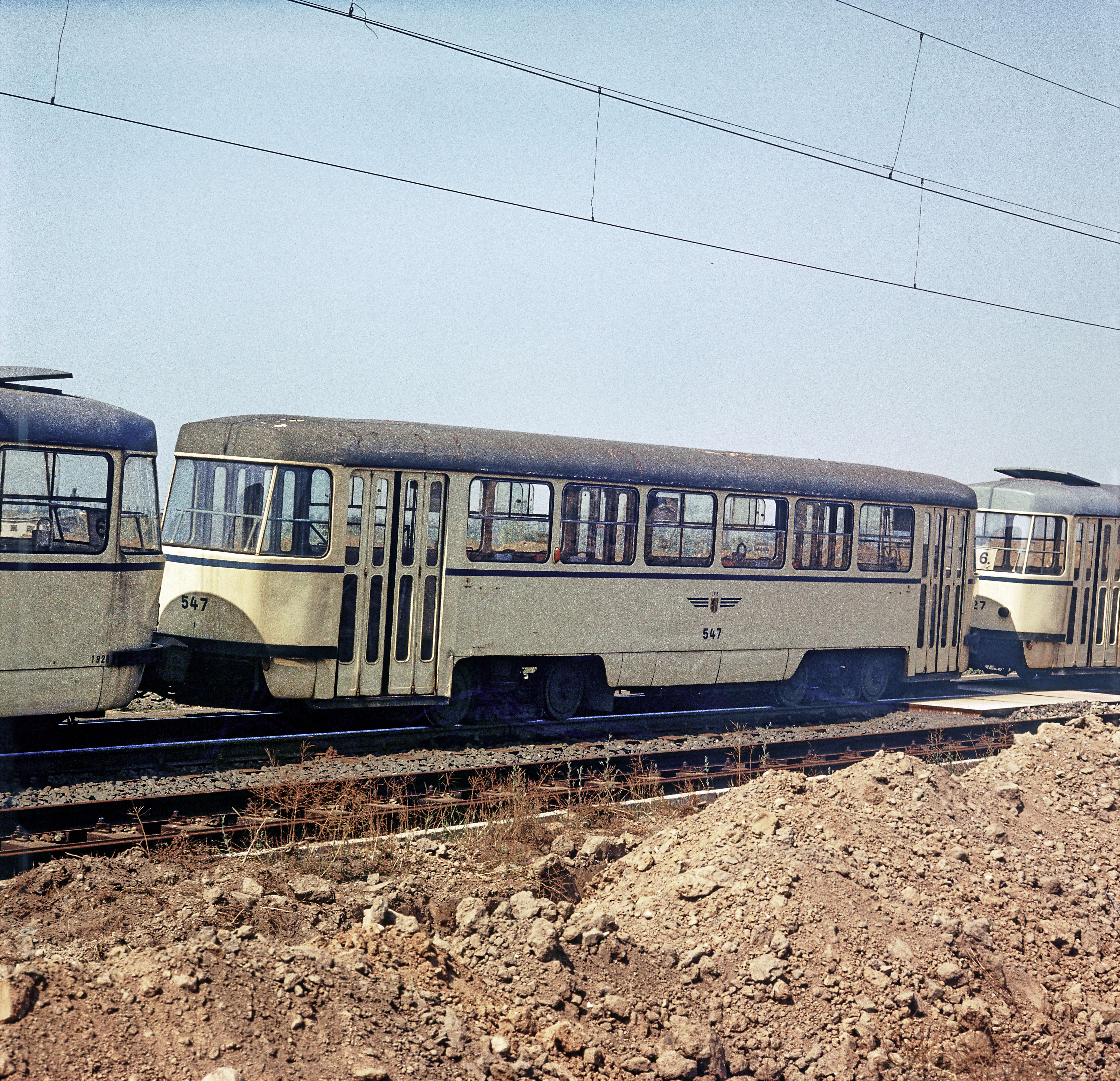 Typ 65b, umgebaut aus einem Einrichtungswagen des Typs 65 (B4D), im Einsatz auf der Pendellinie 6P im Sommer 1988. Nach dem Ende dieses Pendelbetriebes war der Wagen meist abgestellt, wurde nicht modernisiert, schon 1993 ausgemustert und 1995 zerlegt.